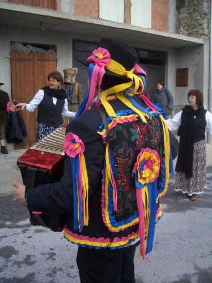 il Sunau e il Cavagnau a Chionea